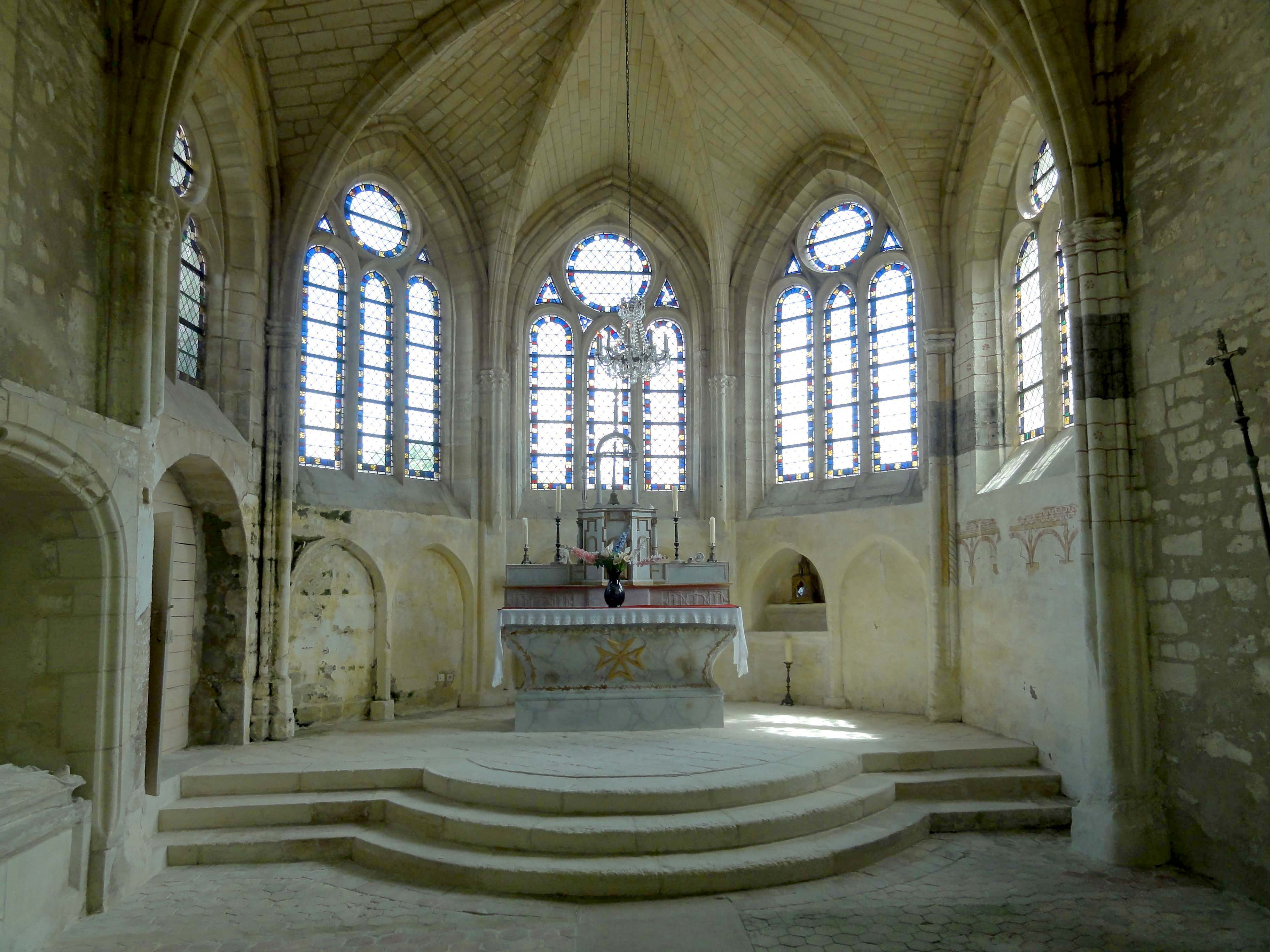 Intérieur de l'église (voir titre).